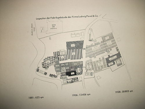 Nordhorn